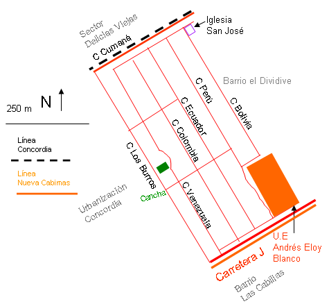 Mapa del sector América de Cabimas. Estado Zulia. Venezuela